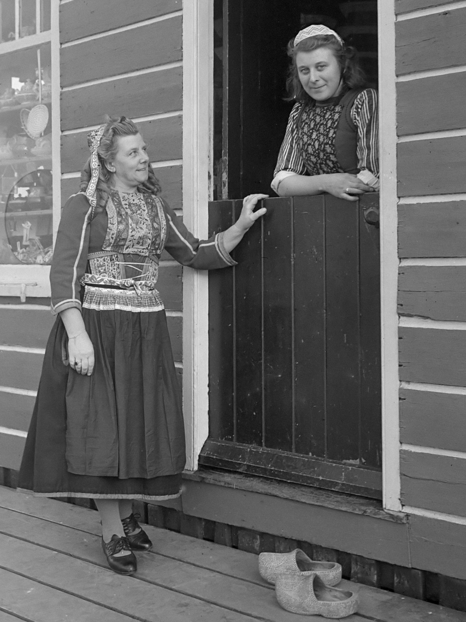 Sijtje Boes (links) bij haar winkel op Marken 16 november 1948